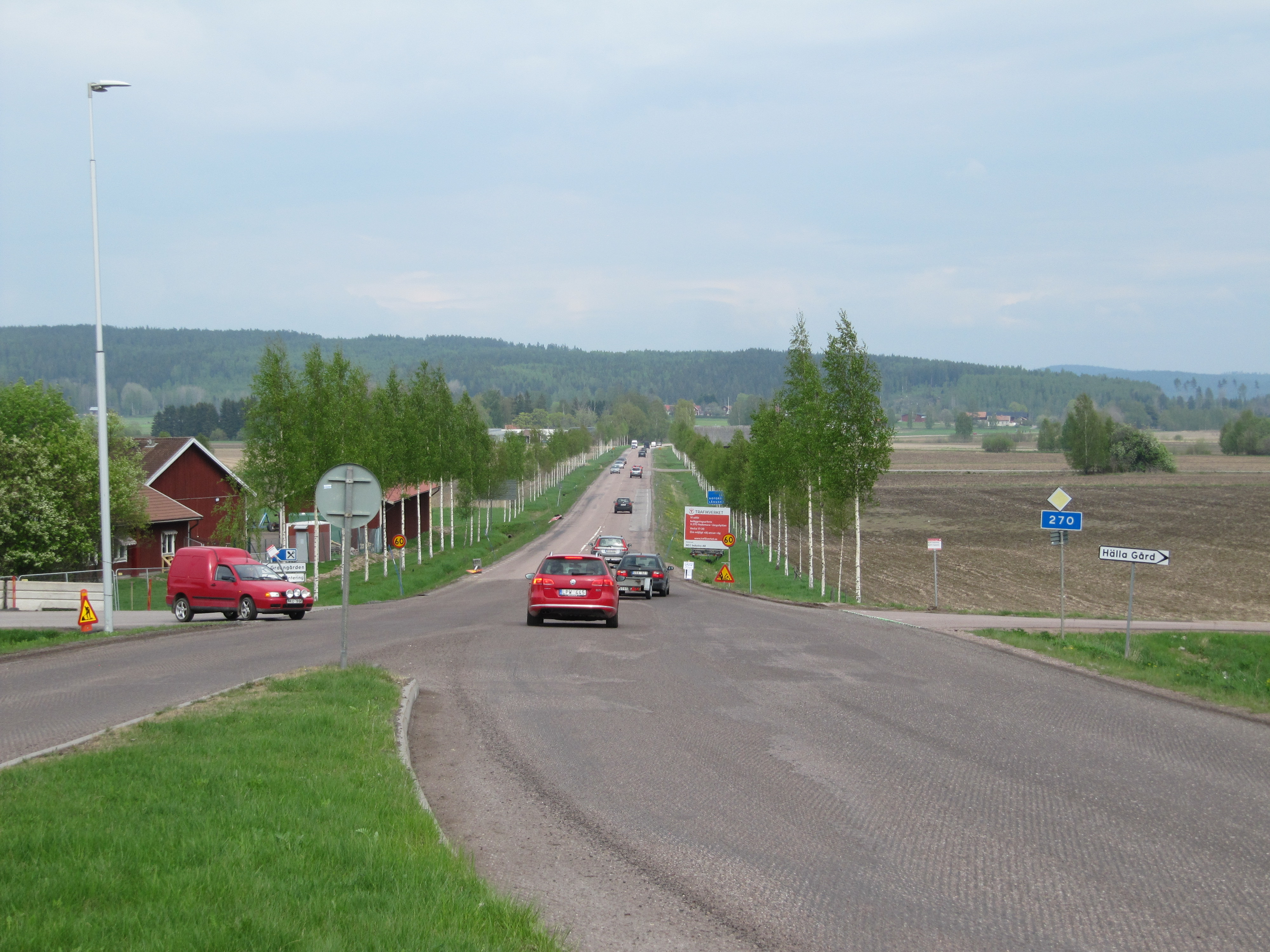 Länsväg 270, Hedemora, Sverige.